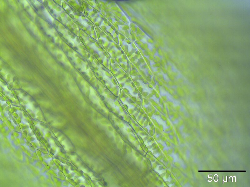 Bryum subapiculatum, Laminazellen, etwa 400x vergrößert, Rostock